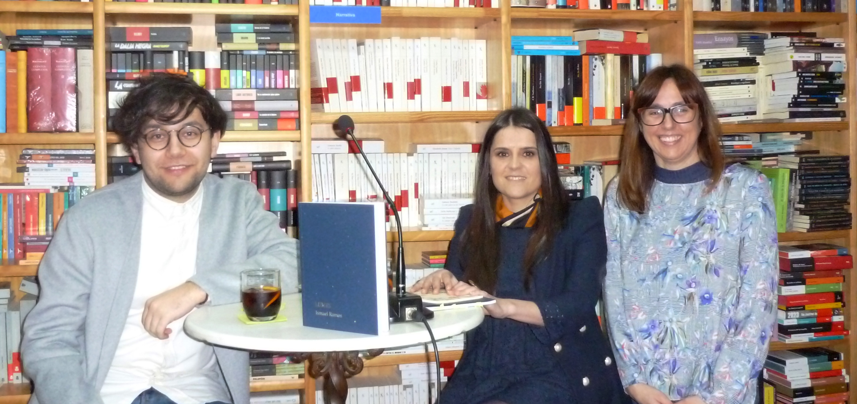 Ismael Ramos, Miriam Ferradáns e Ana Cabaleiro na libraría Paz de Pontevedra, na presentación do poemario Lumes